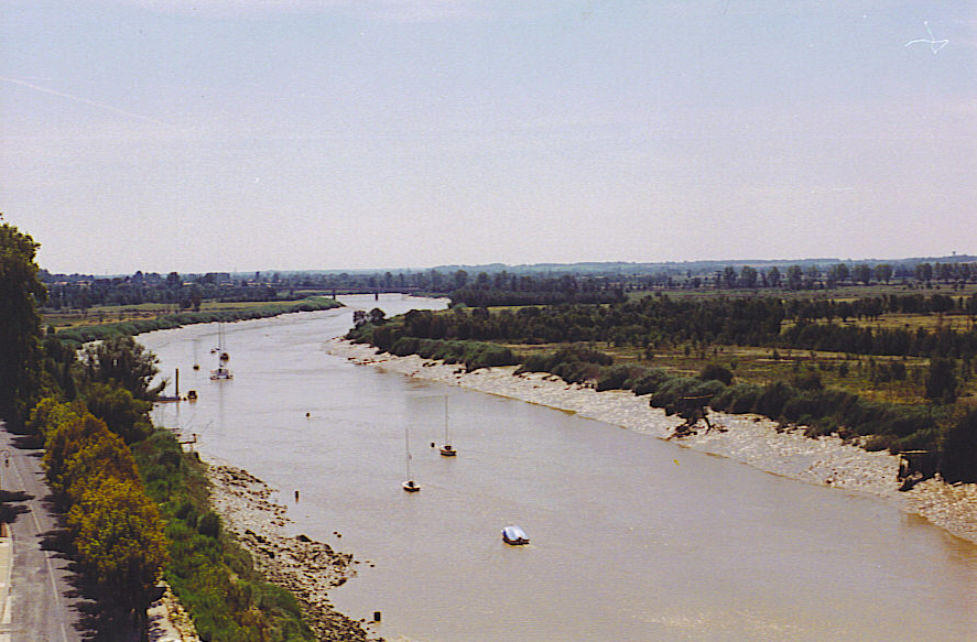 Charente nabij Rochefort - eigen foto